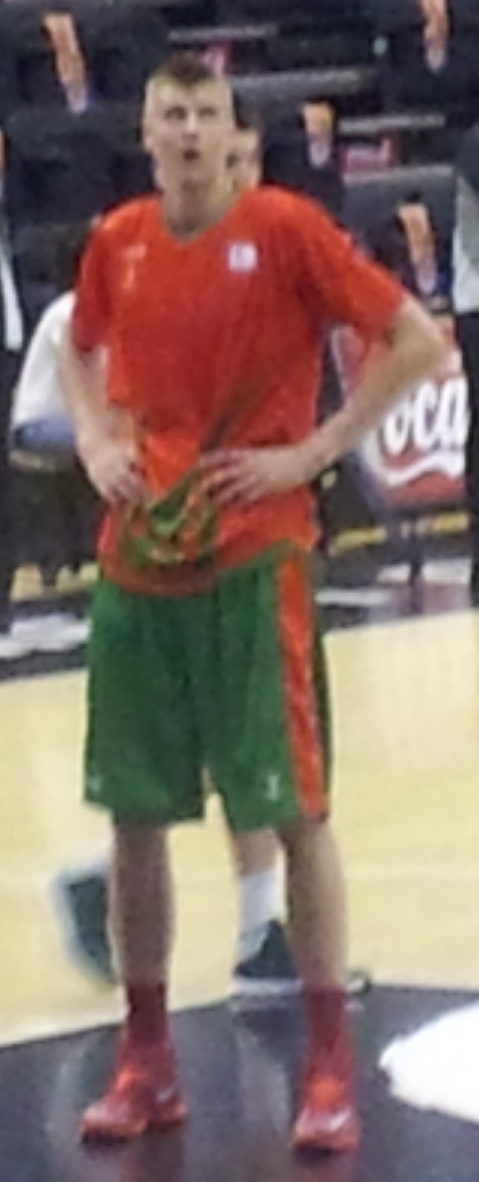 Jugador letó del Cajasol Sevilla